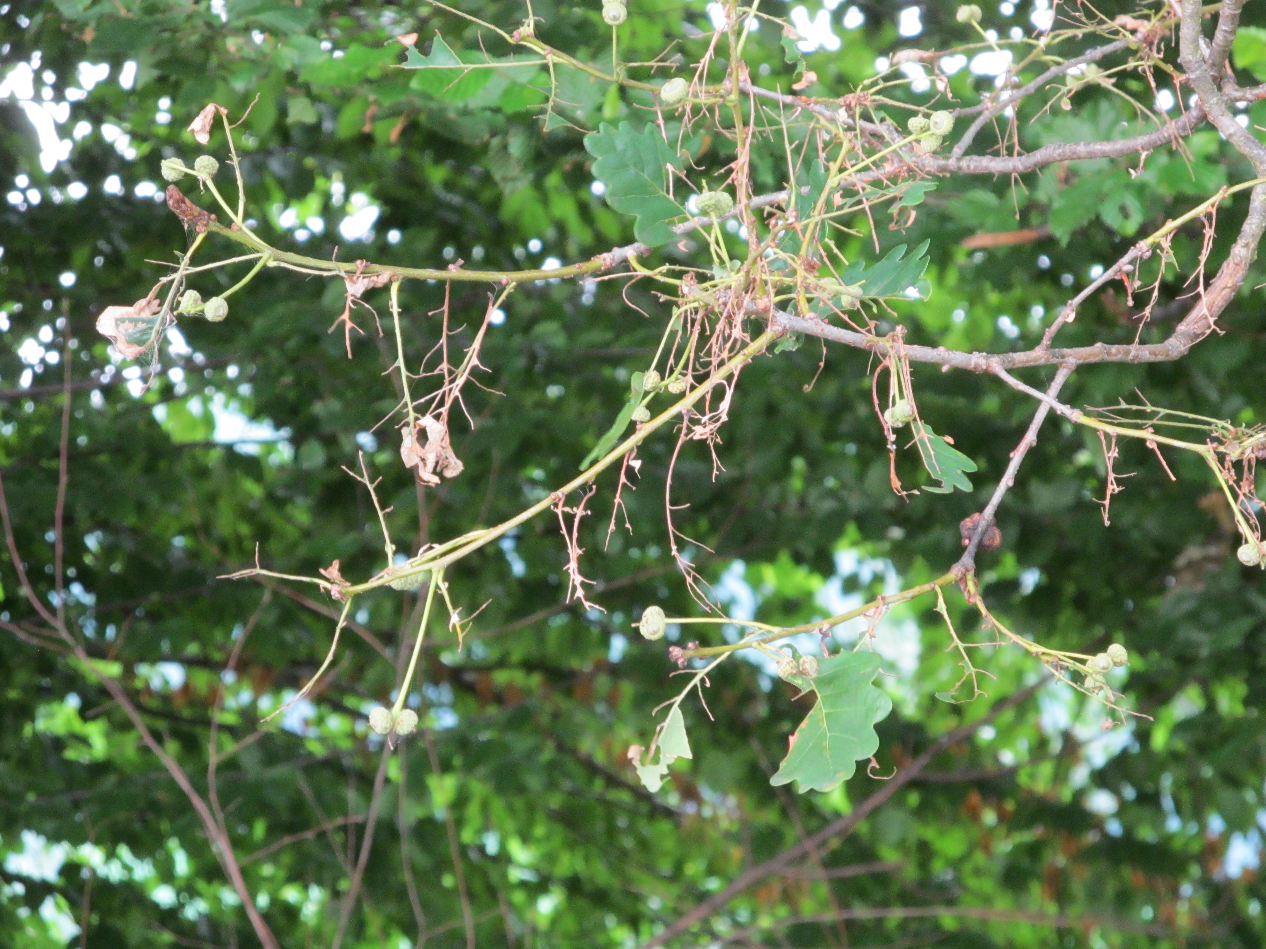 Angefressene Blätter von Eichen-Prozessionsspinner in Ziemetshausen Juni 2018.